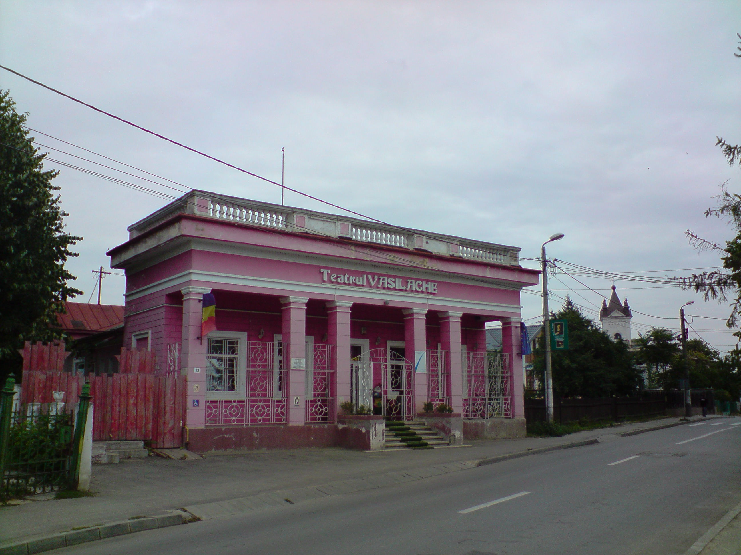 Botosani Teatrul de papusi Vasilache